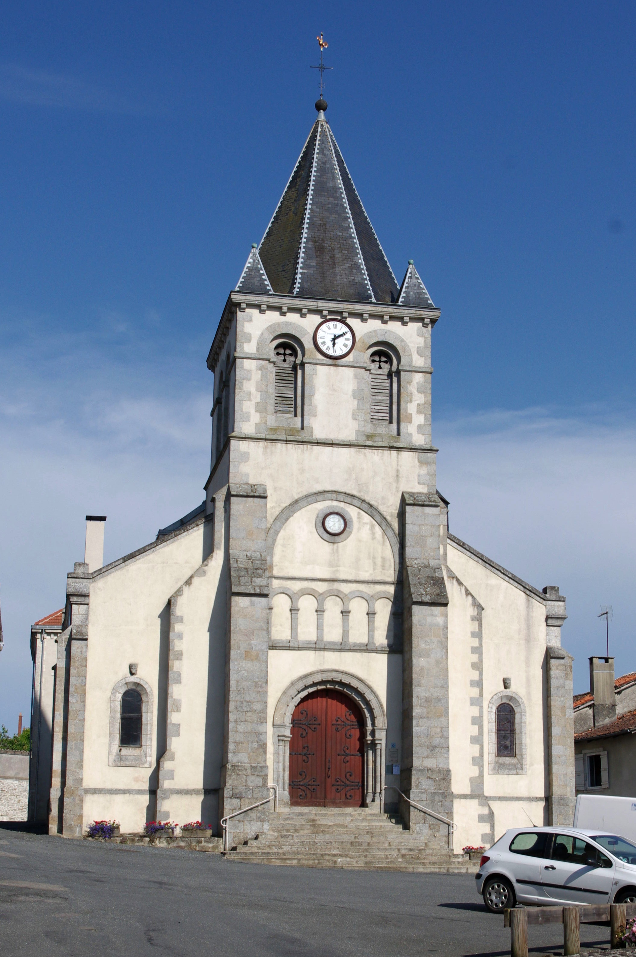 L'église de Oradour sur Vayre, Haute Vienne, France.